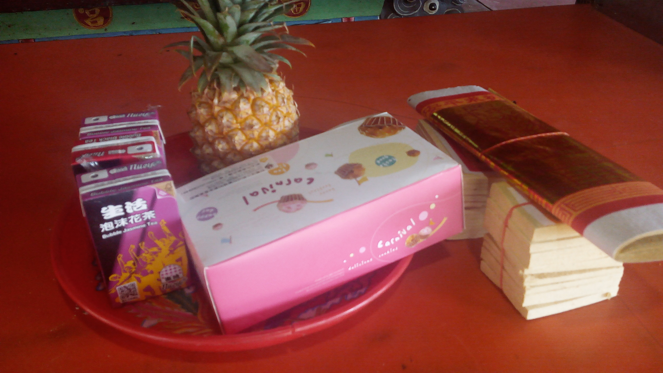 中文（台灣）: 台灣民間信仰 信眾供奉的供品。主要見於佛教和道教。或佛道教。通常有飲料、餅乾、水果、三牲等。可另外選擇放上金紙感謝神明。